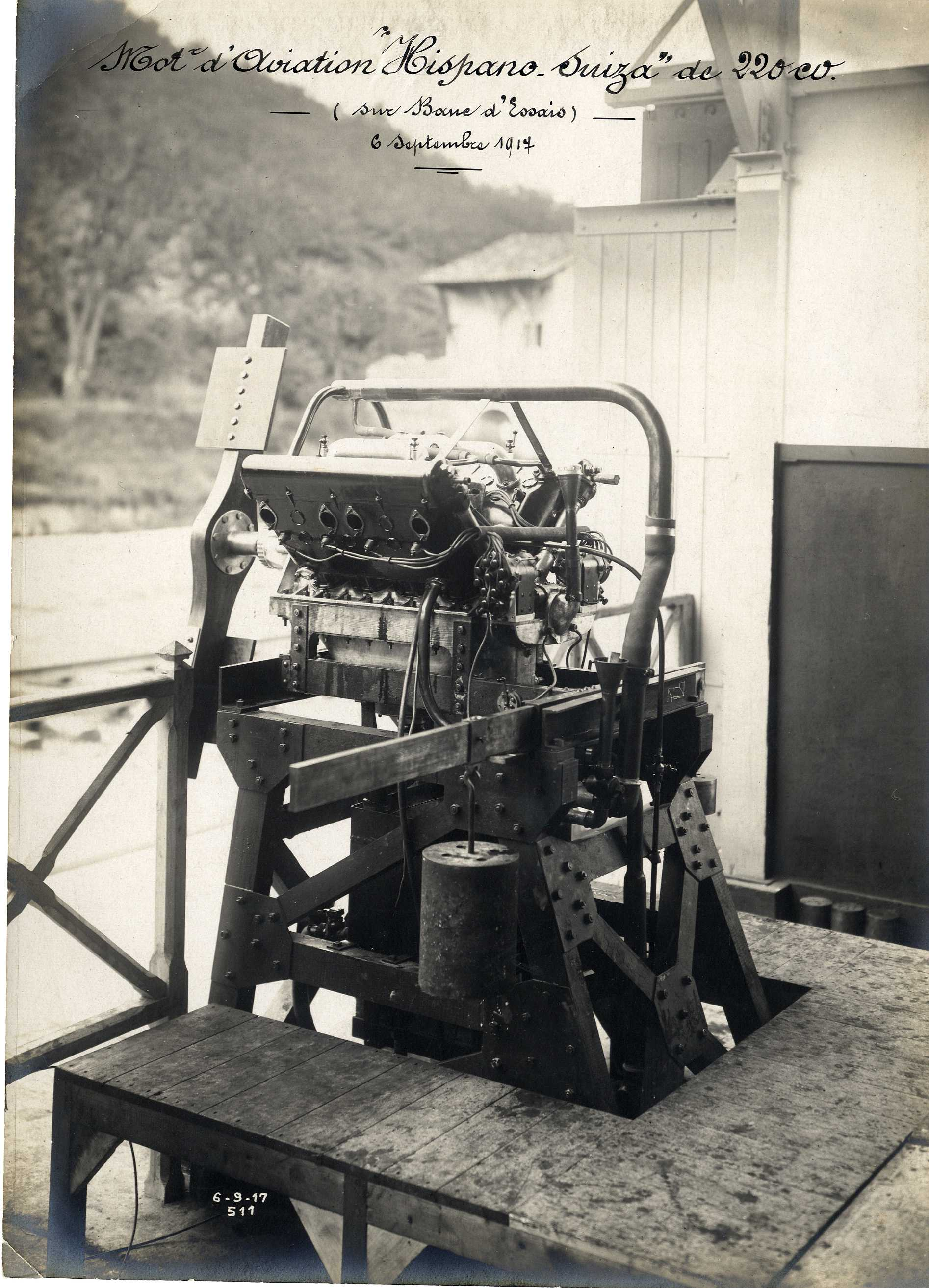 Fives-Lille Givors, production du moteur d'avion Hispano-Suiza. Archives municipales de Givors, cote 5Fi 2015 13